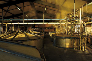 atelier de fermentation, rhum